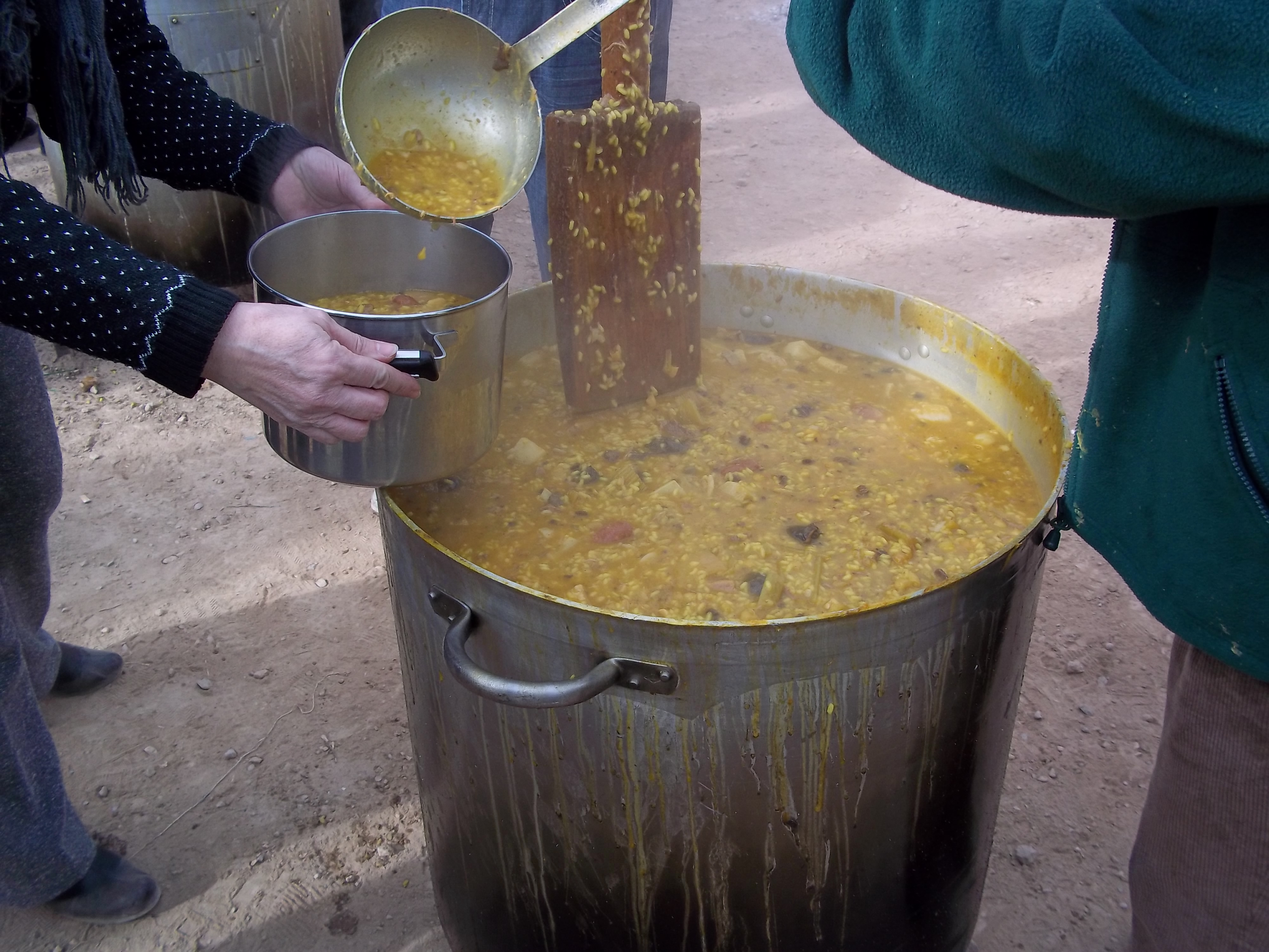 Cuinant Caldera a Massalfassar